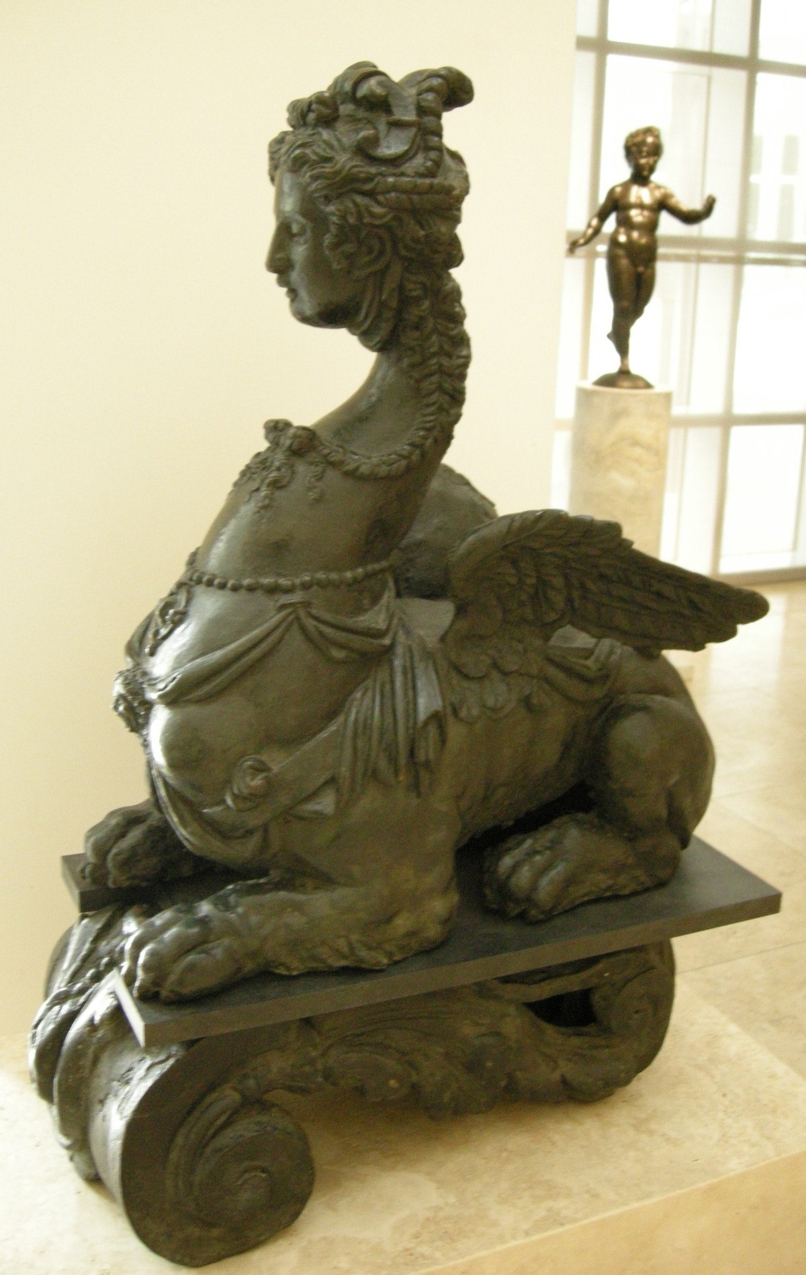 Artista italiano, coppia di sfingi, 1560 ca.